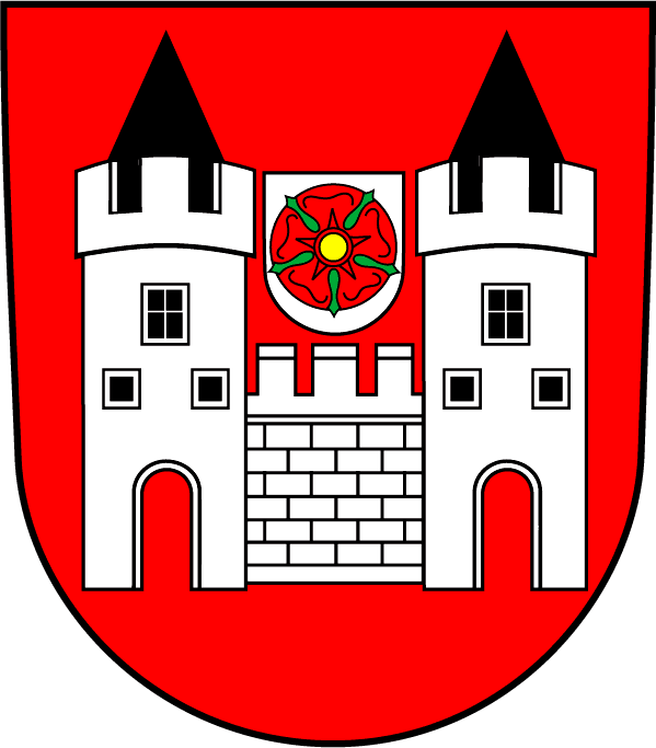 Wappen von Vyšší Brod (deutsch: Hohenfurth) in der Tschechischen Republik